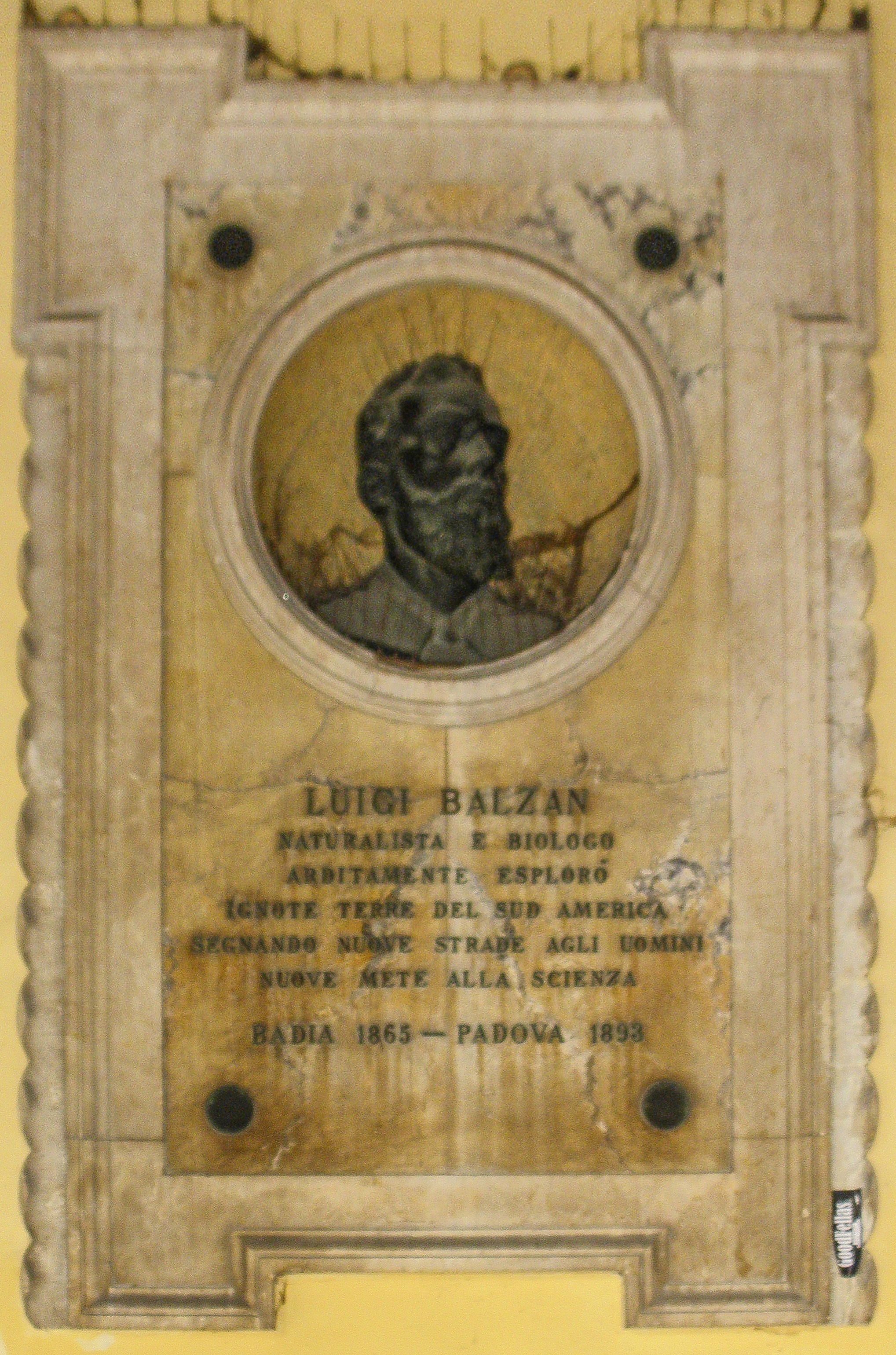 Badia Polesine, il monumento commemorativo in memoria del naturalista e biologo Luigi Balzan sito nel porticato del Palazzo del Comune.